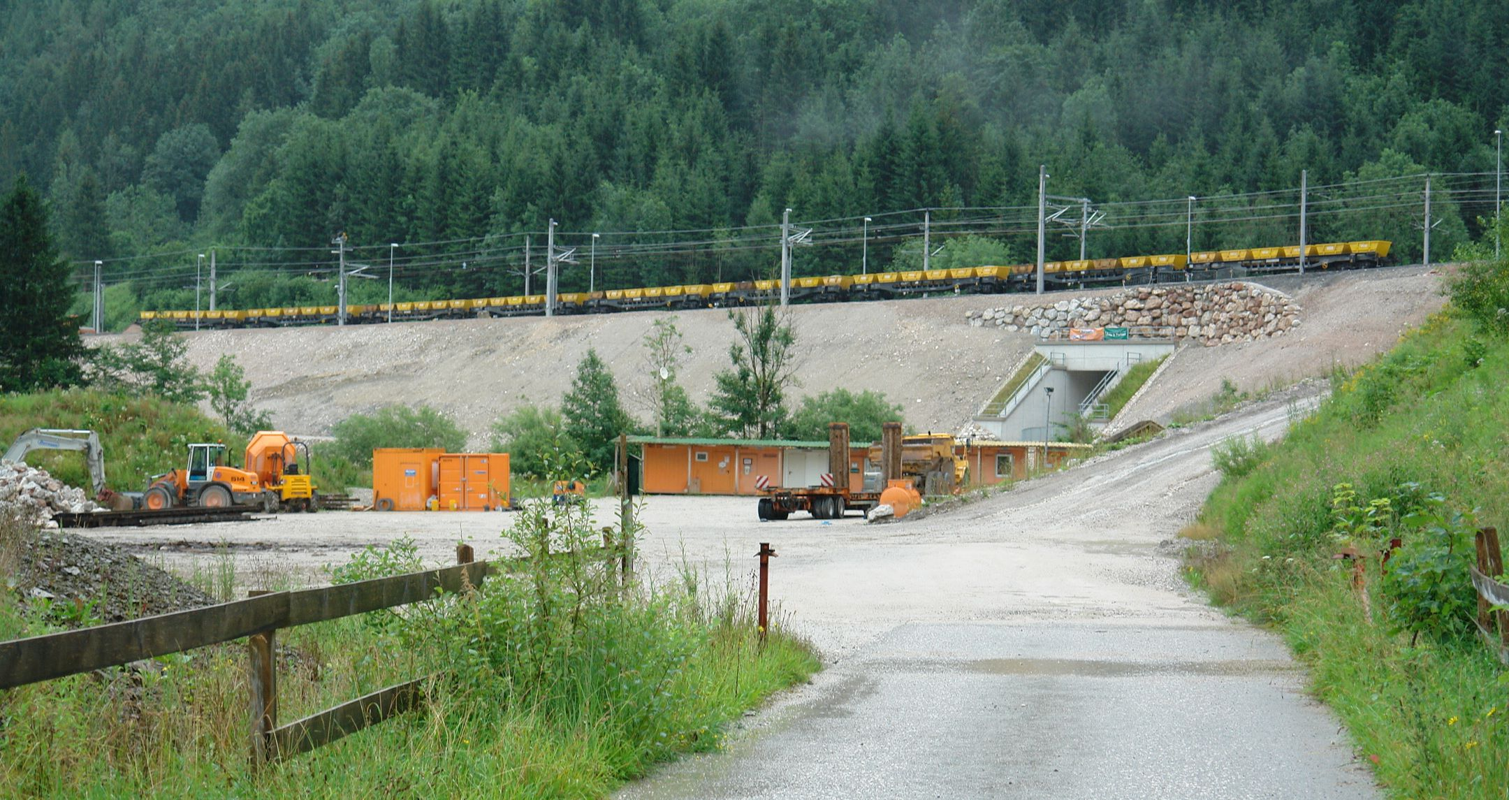 Bau der Betriebsausweiche Linzerhaus der Pyhrnbahn im Juli 2016